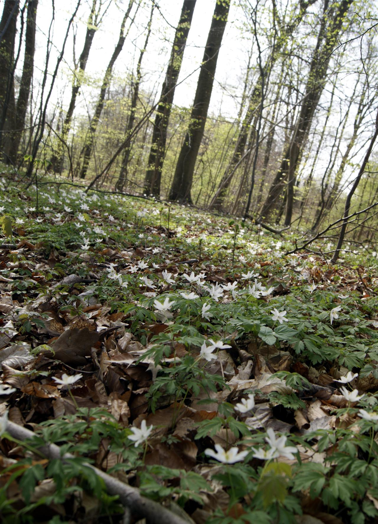 Zawilec gajowy